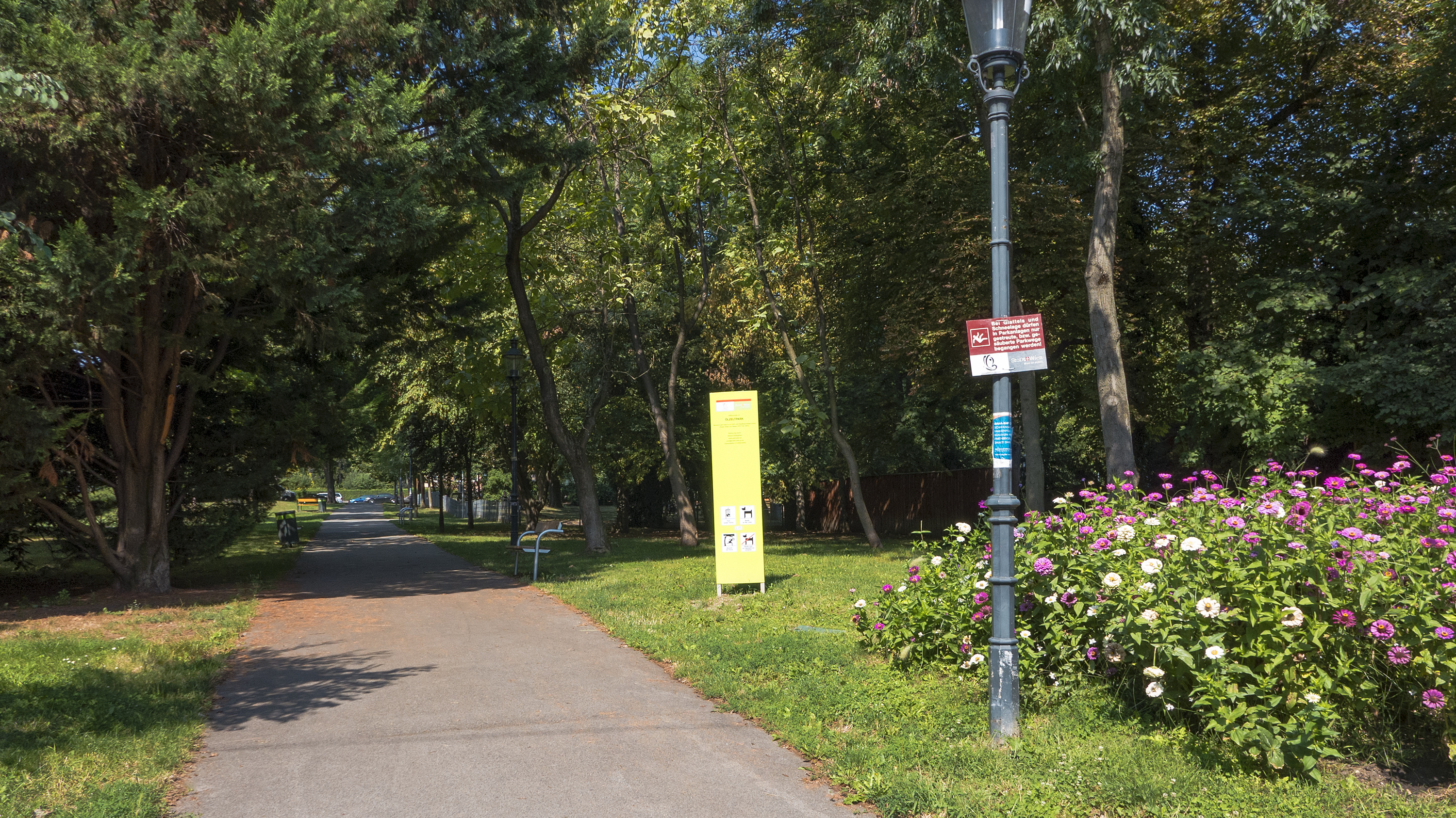 Ölzeltpark in Wien 23